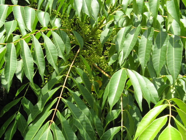 Rhus succedanea - 01